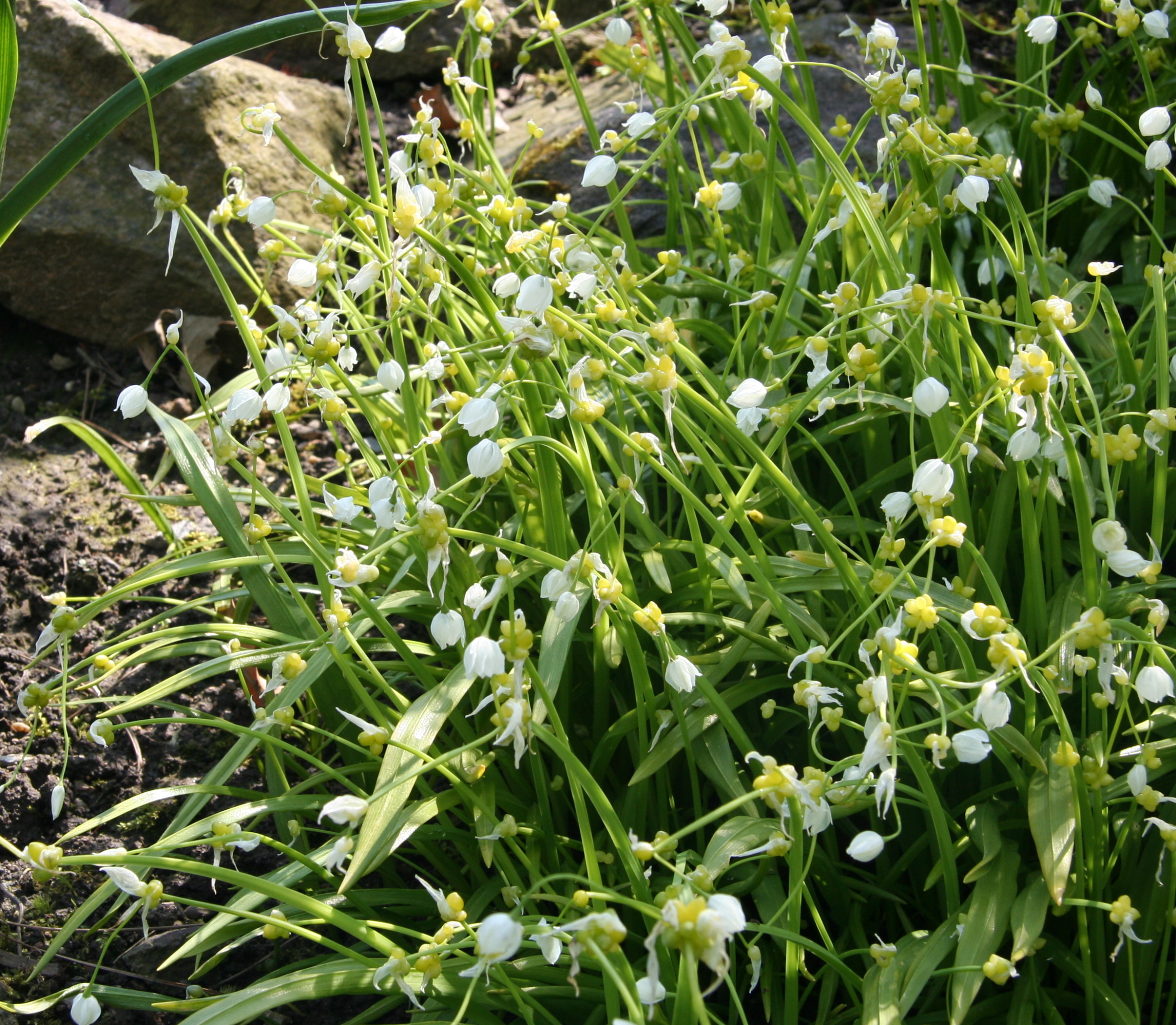 Allium paradoxum im Botanischen Garten Dresden